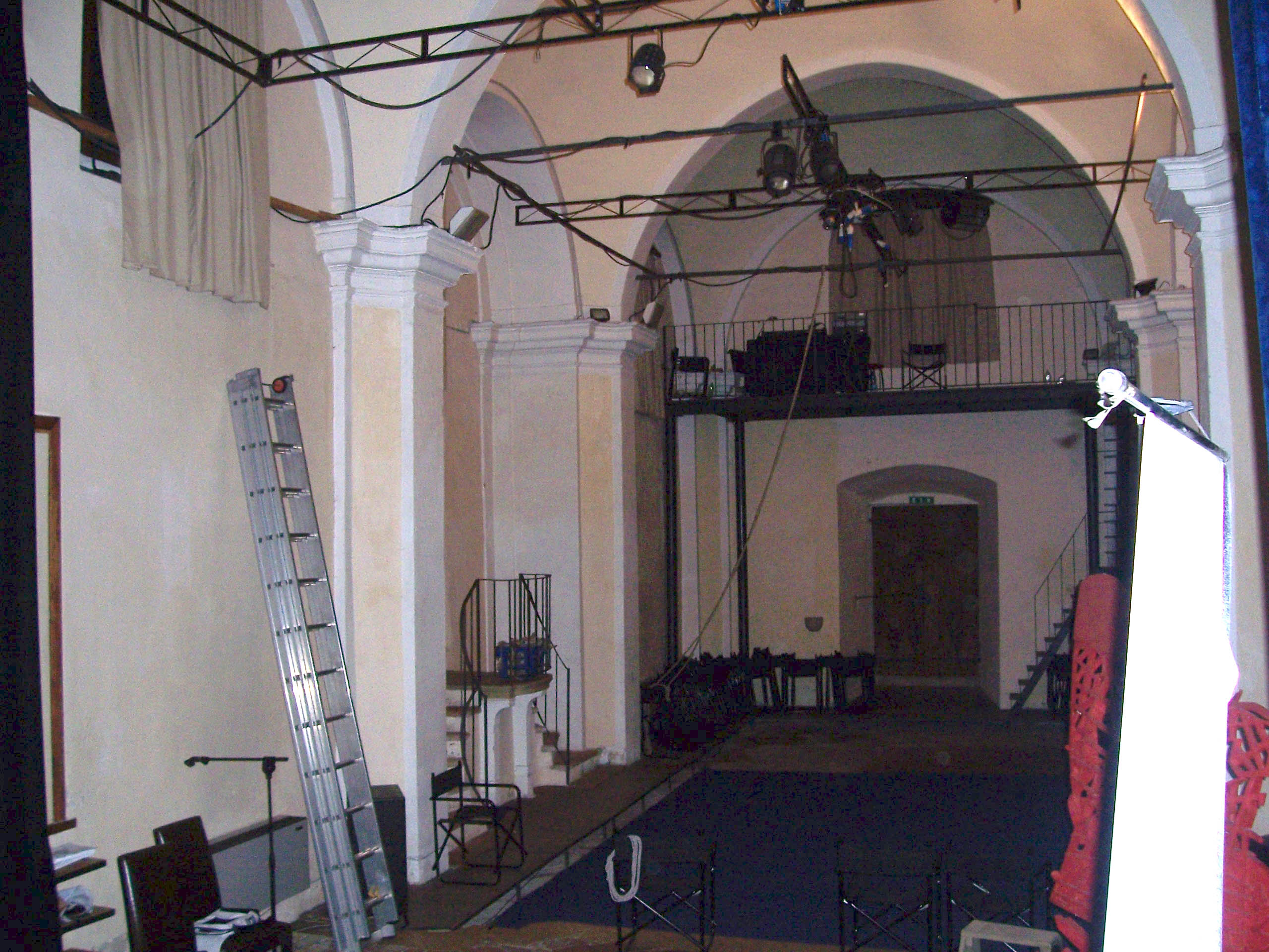 san desiderio brescia interno.jpg